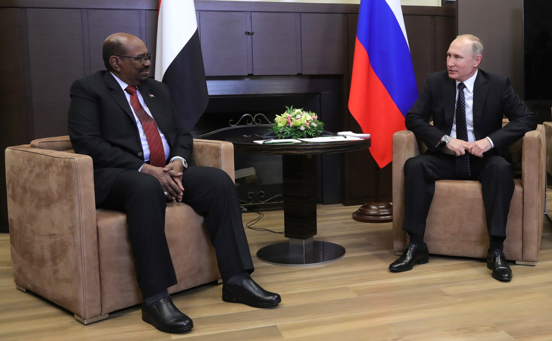 Президент России Владимир Путин с Президентом Республики Судан Омаром Баширом